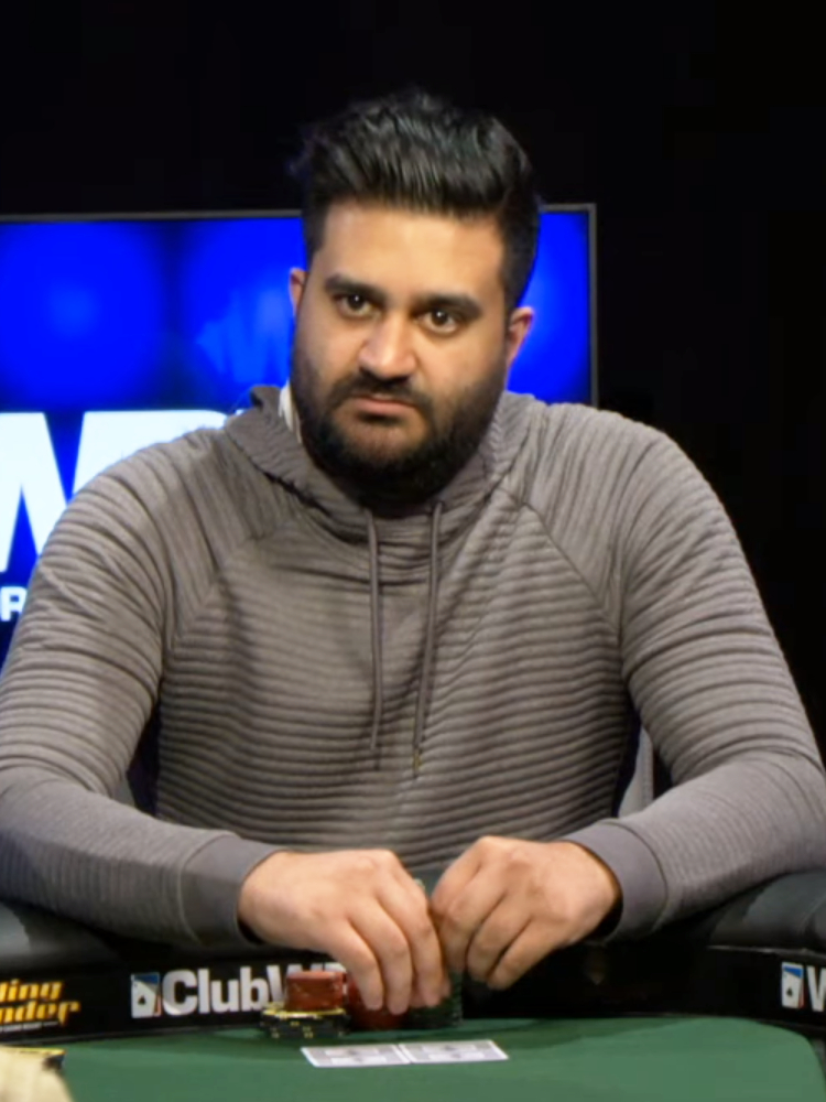 Shankar Pillai am Finaltisch des WPT Rolling Thunder